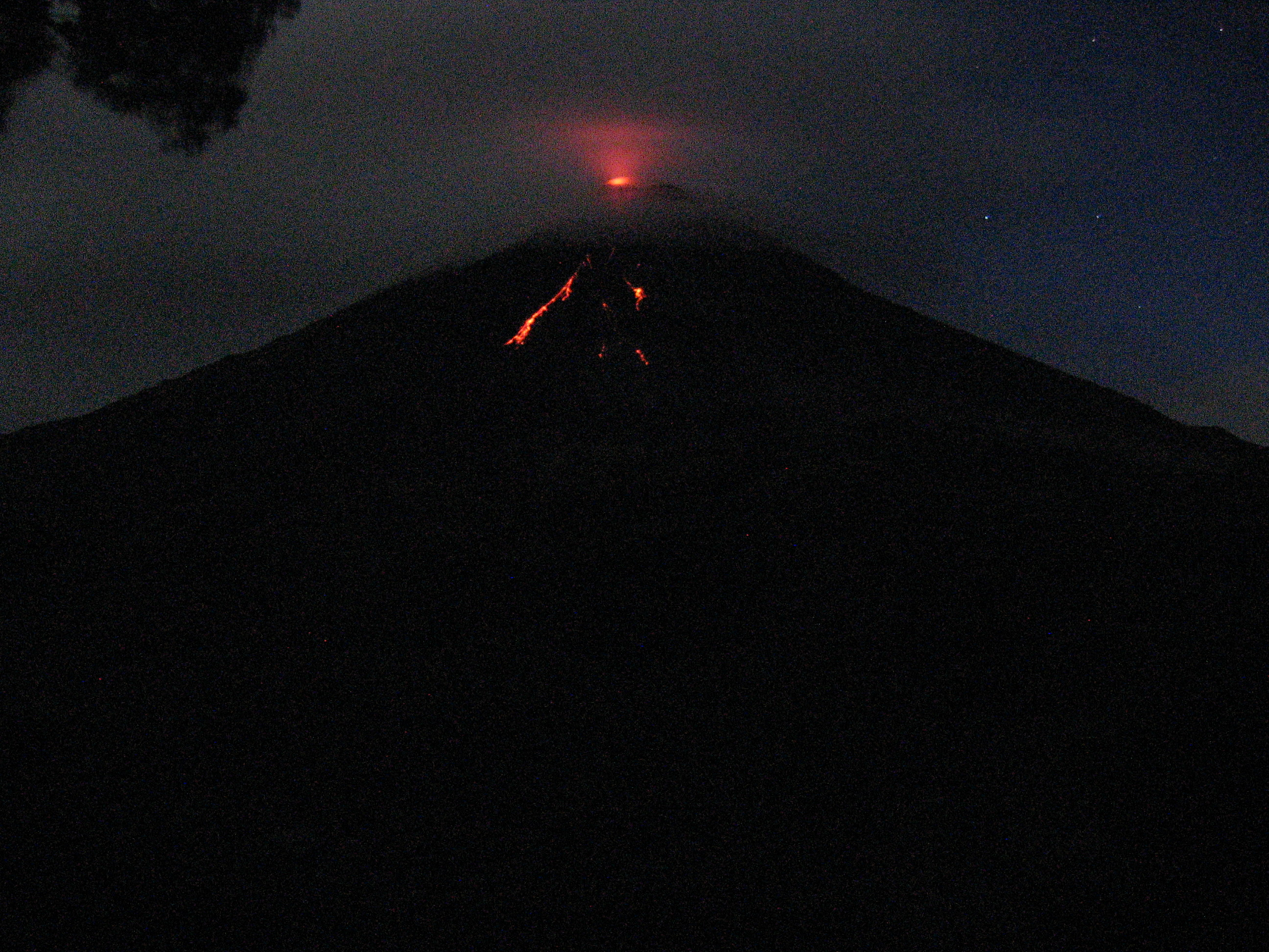 Arenal Volcano at night